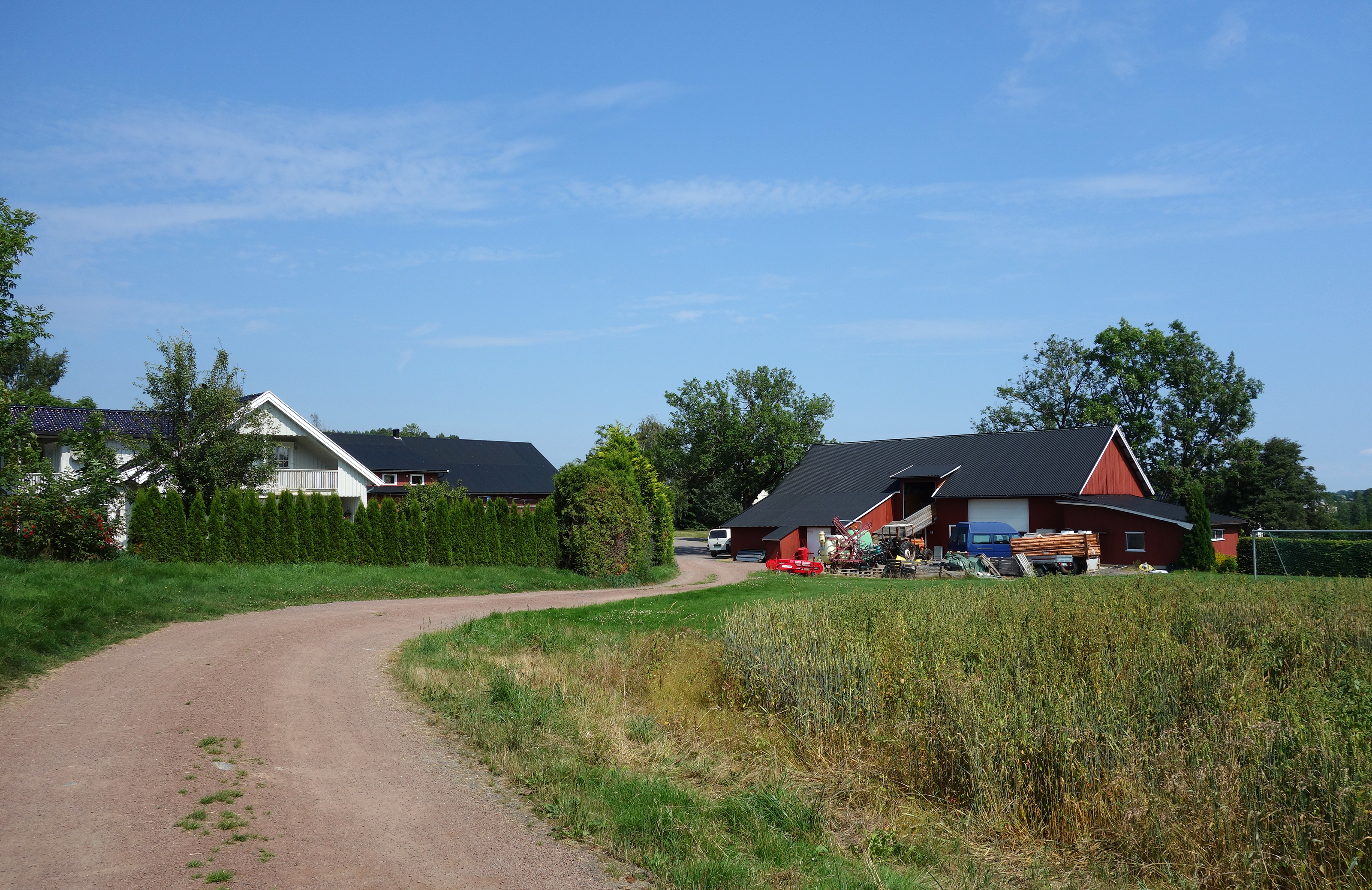 Sande på Nøtterøy